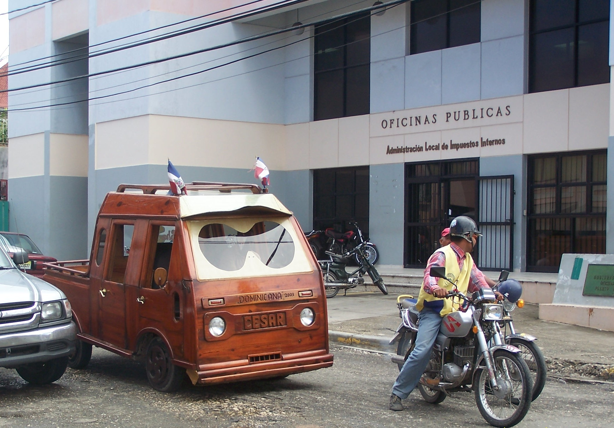 Waarschijnlijk Puerto Plata (zie plaket bij Oficina)